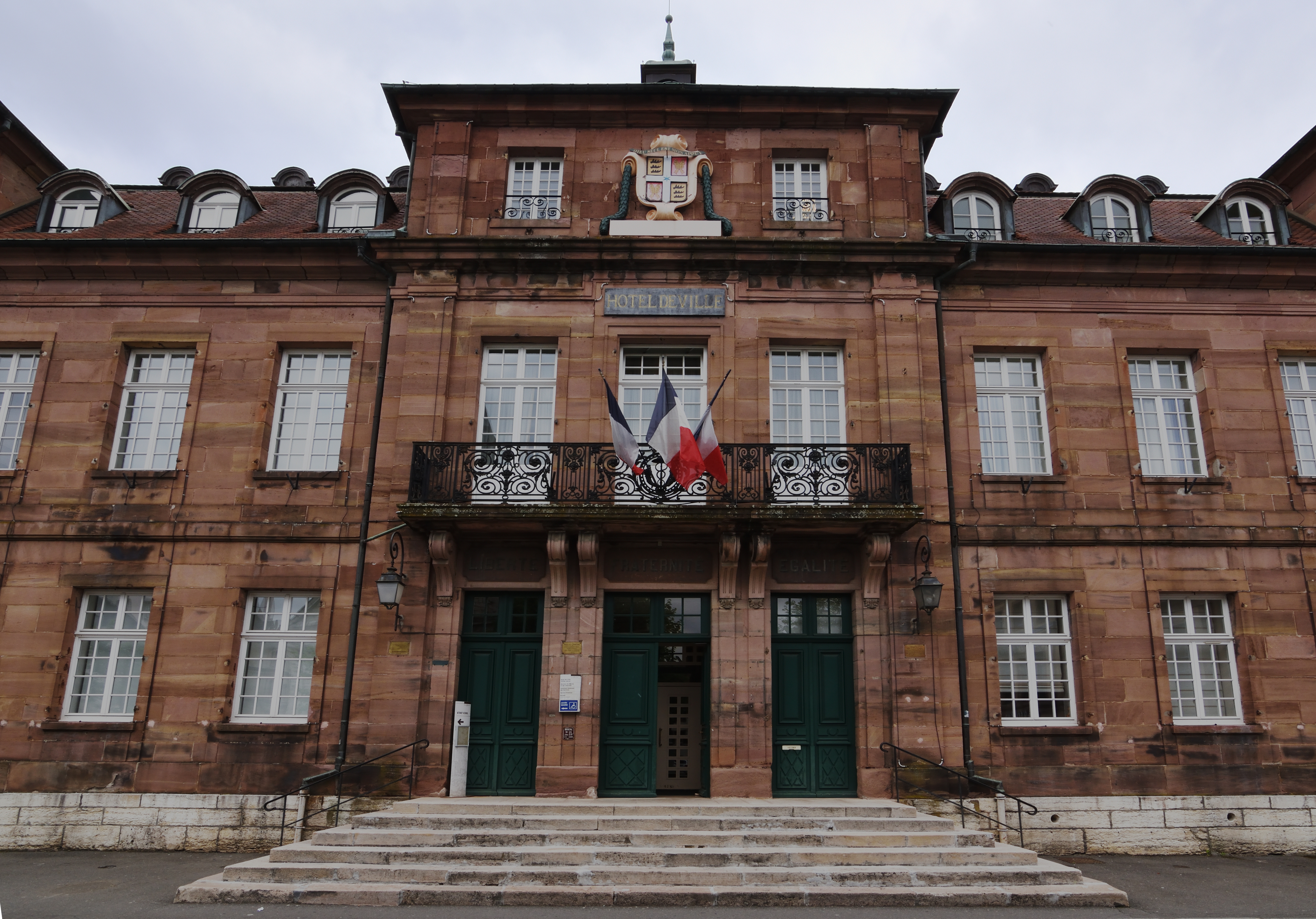 La mairie de Montbéliard